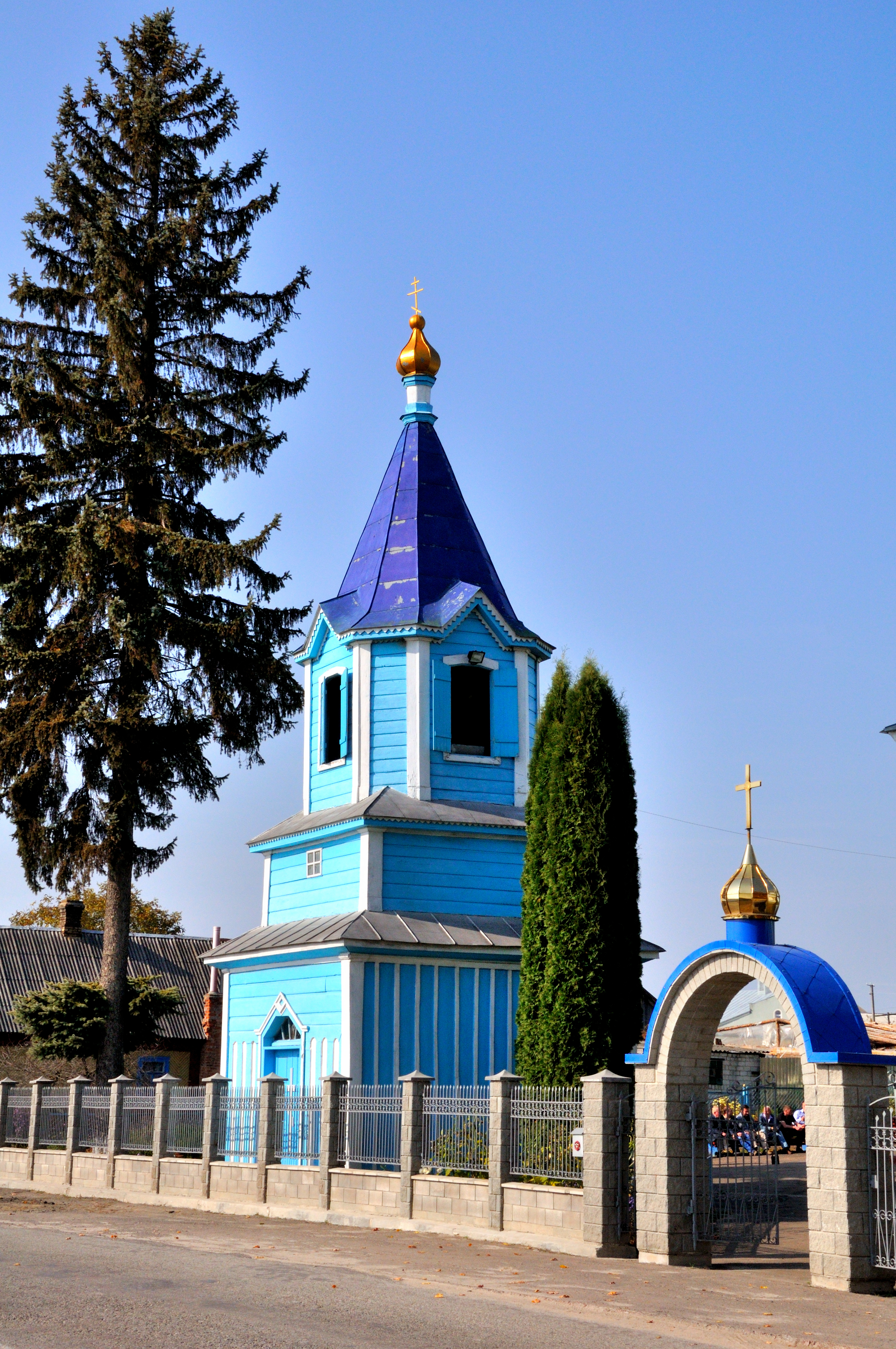 Дзвіниця Преображенської церкви (мур.), с.Олександрія